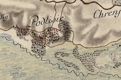 xviii